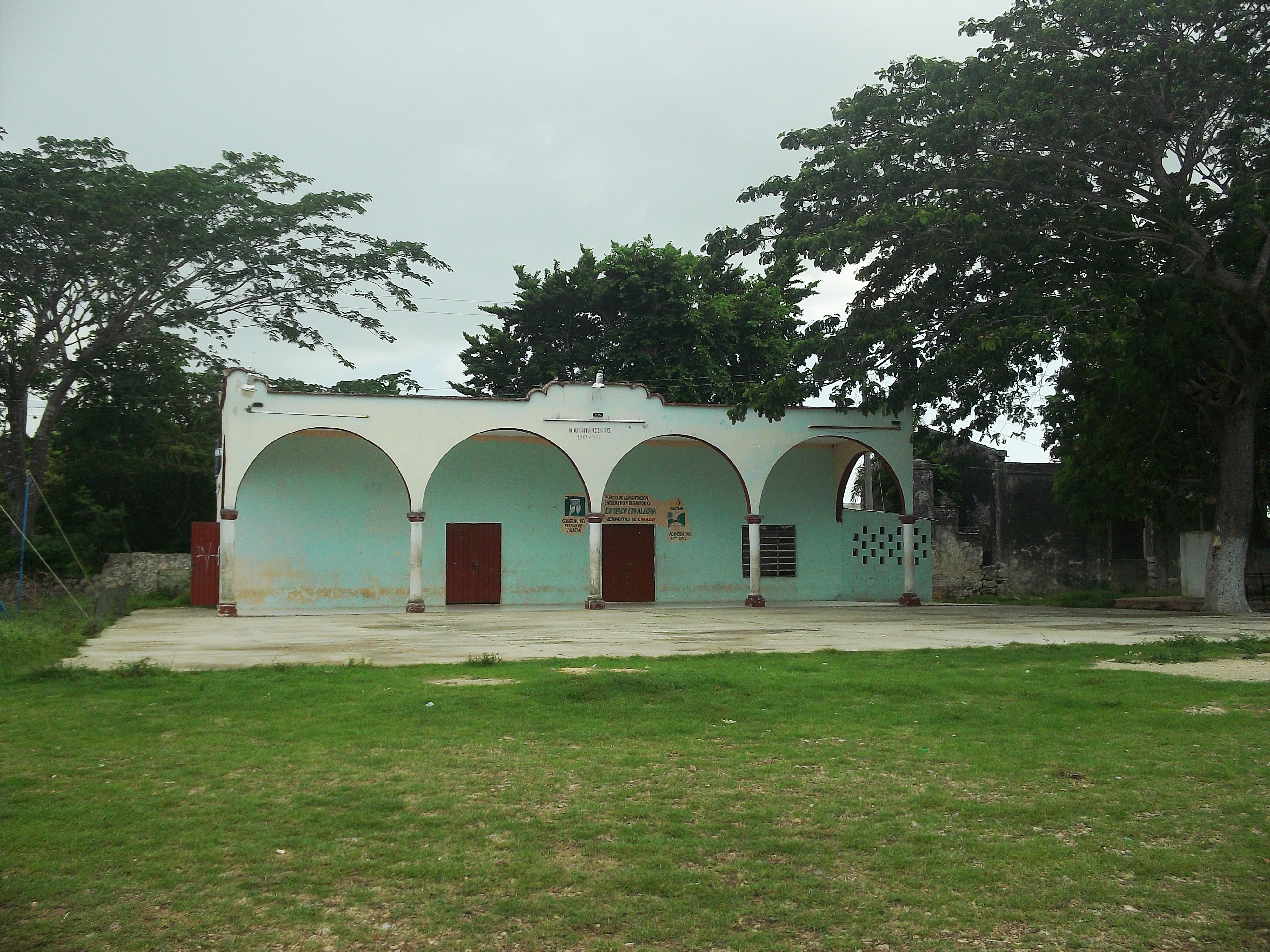 Casa comisarial de Petectunich, Yucatán.